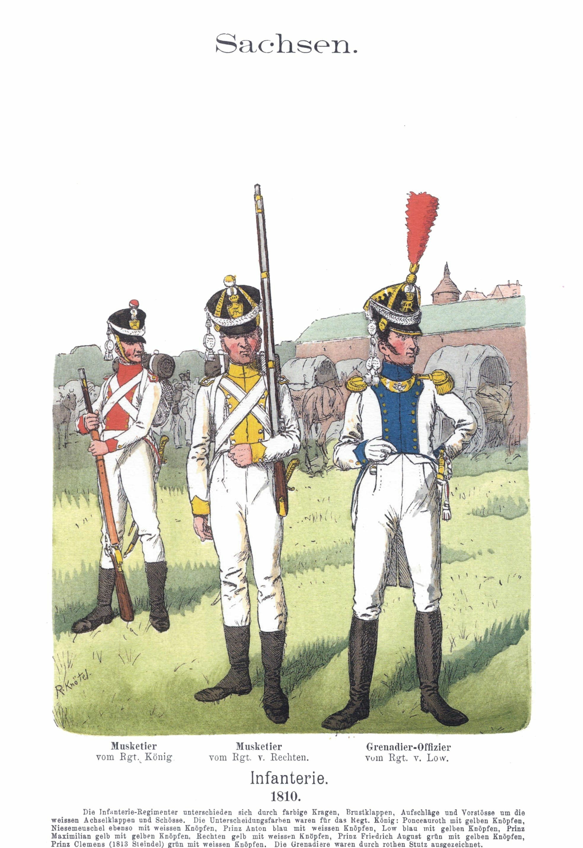 Иллюстрация Рихарда Кнотеля